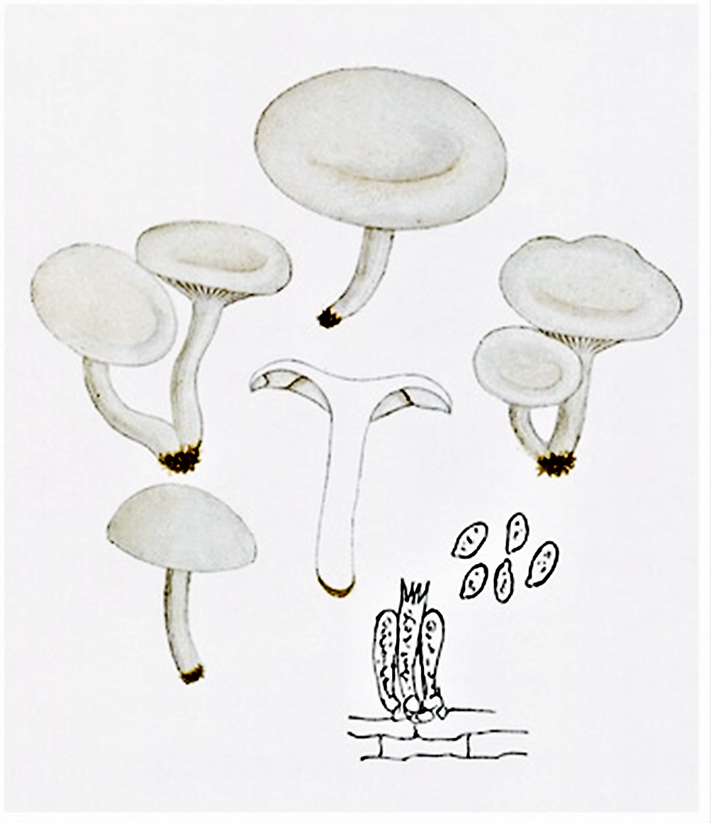 Giacomo Bresadola: Clitocybe dealbata (James Sowerby, 1799 ex Paul Kummer, 1871)